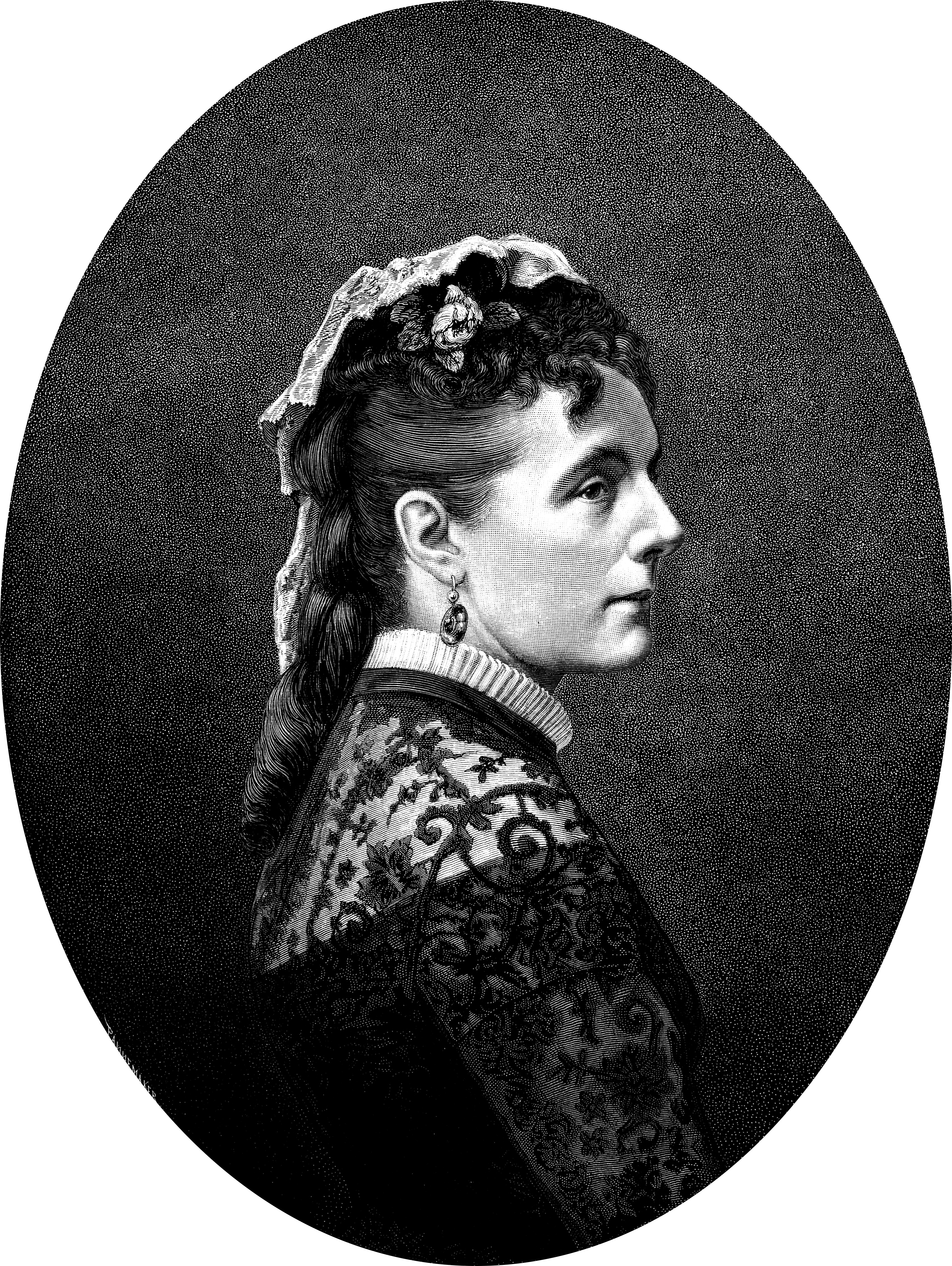 S.M. la reine Marie-Henriette de Belgique.